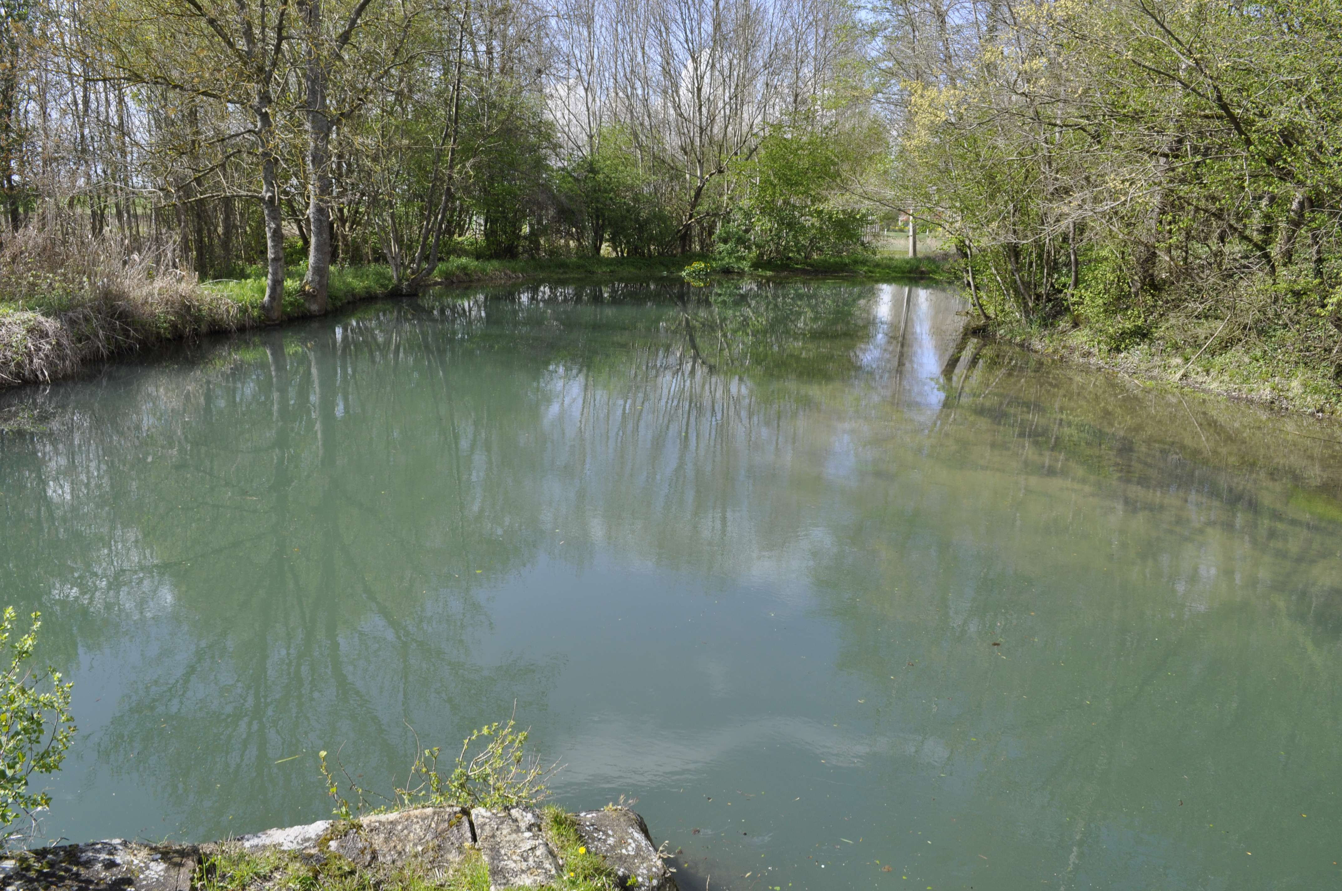 Confluence de la Bèze et de l'Alban à Drambon (Côte d'Or).